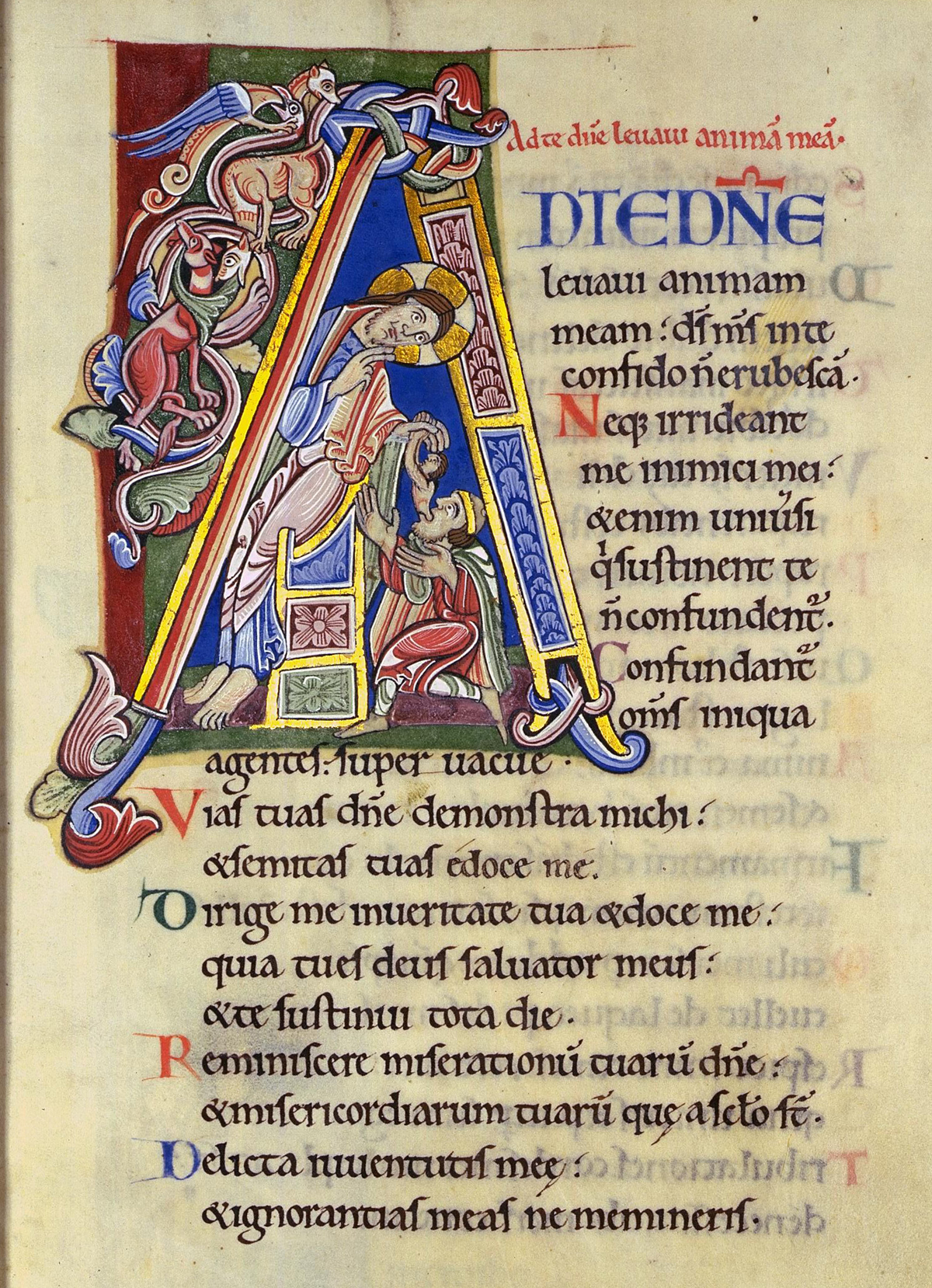 Psalm 24 (Vulgata, hebr./modern: Psalm 25), Initial A. In: Albani-Psalter